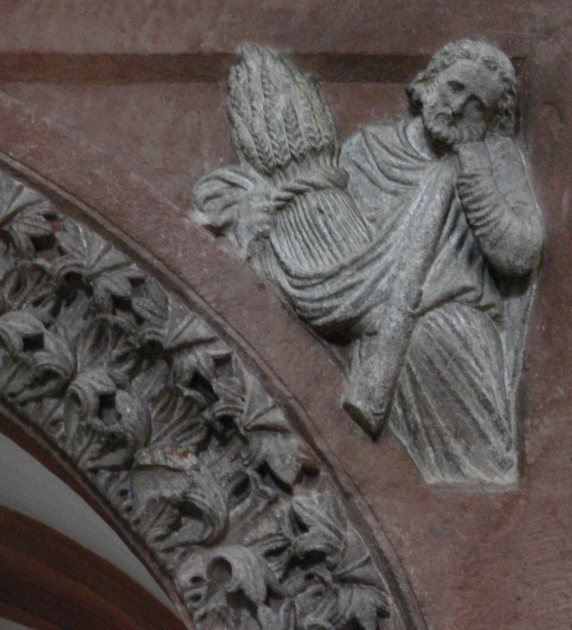 Wechselburg, Landkreis Mittelsachsen: Kloster Wechselburg, Romanische Basilika Lettner, Detail der Lettnerkanzel: Relief Kain mit nicht angenommenen Getreideopfer und der Keule, mit der er Abel erschlägt